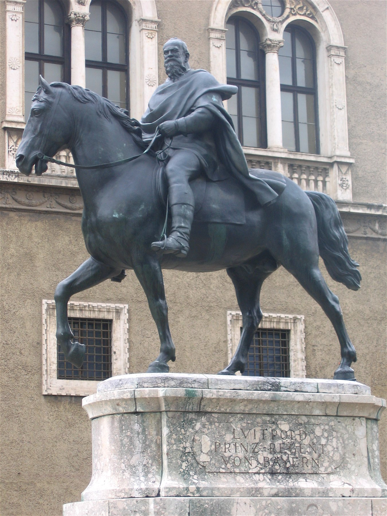 Reiterdenkmal für Luitpold von Bayern, Standort: vor dem Bayerischen Nationalmuseum in München